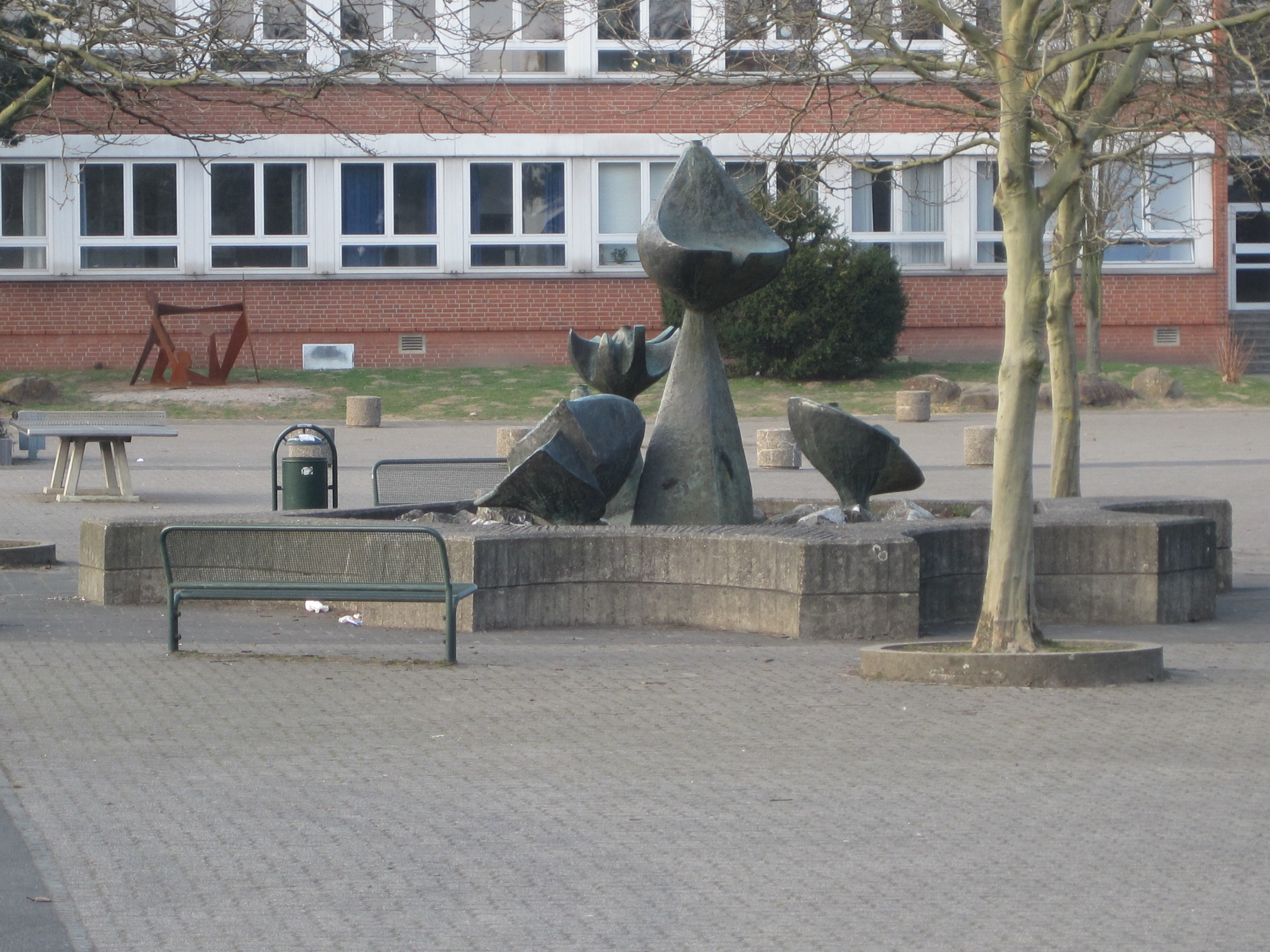 Das Foto zeigt den Brunnen auf dem Schulhof des Galilei-Gymnasiums Hamm.